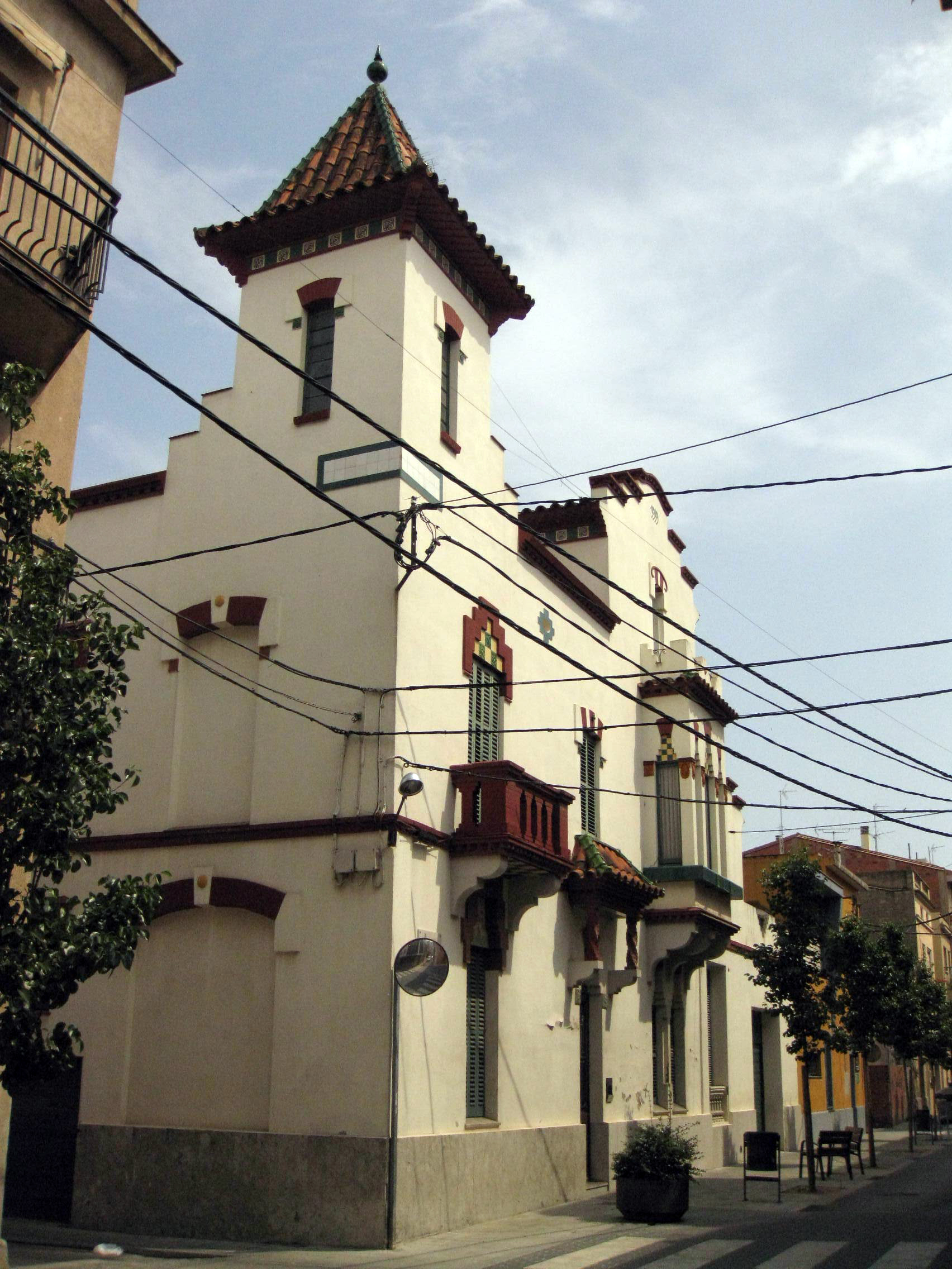 Casa Juez (Figueres)